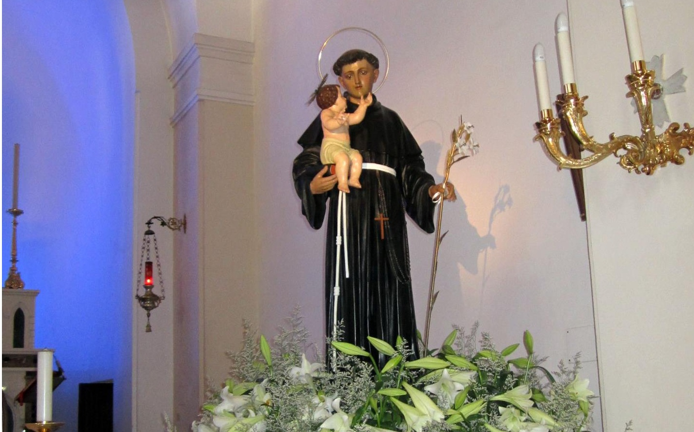 Statua di Sant'Antonio da Padova venerata a Palmi e collocata in un altare laterale della Chiesa del Rosario